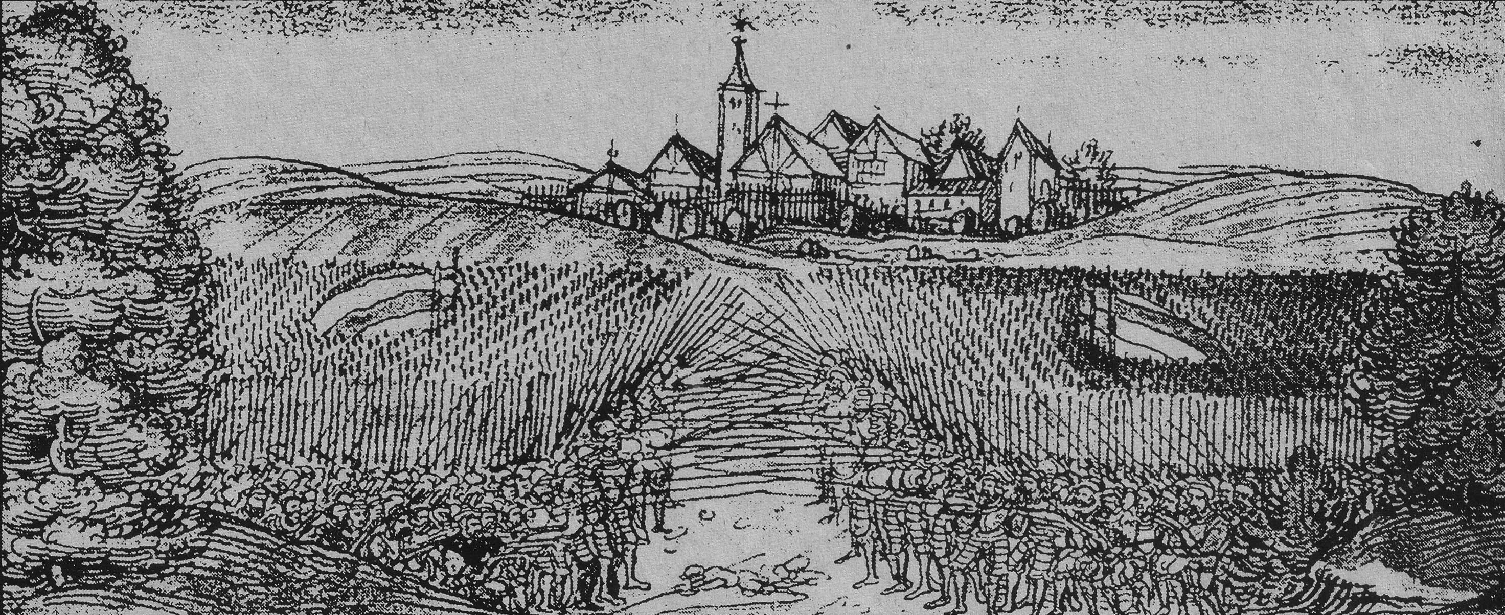 Schlacht von Bergtheim, zeitgenössische Darstellung aus der Friesschen Chronik (15. Jh.)